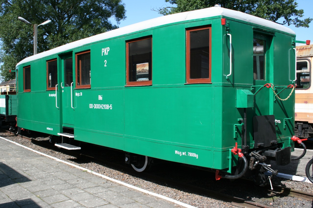 Wagon Bhi na Stałej Wystawie Pomorskich Kolei Wąskotorowych